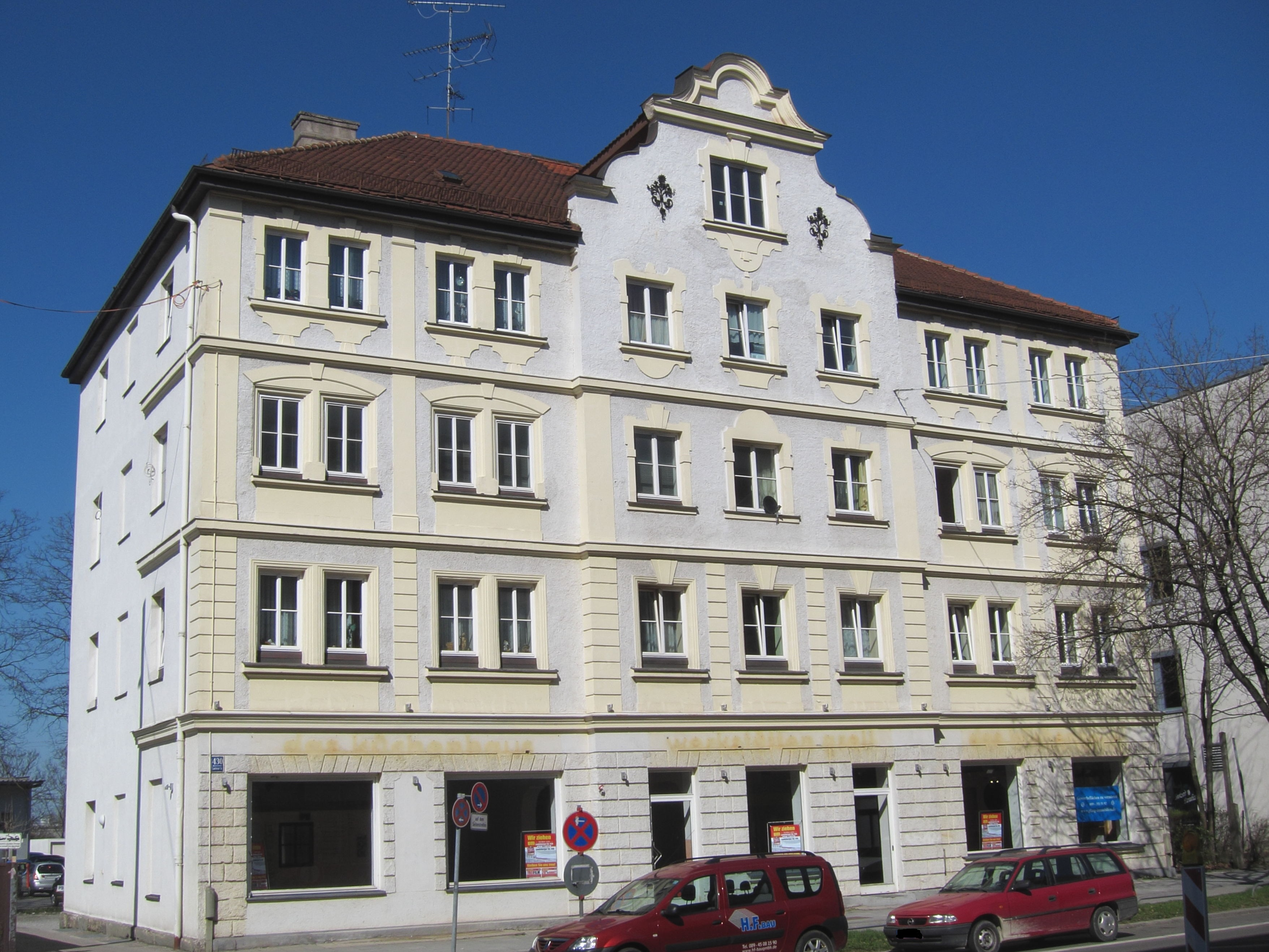 Landsberger Straße 430; Wohnhaus, neubarock, viergeschossig mit höherem Mittelrisalit, Schweifgiebel, um 1900.